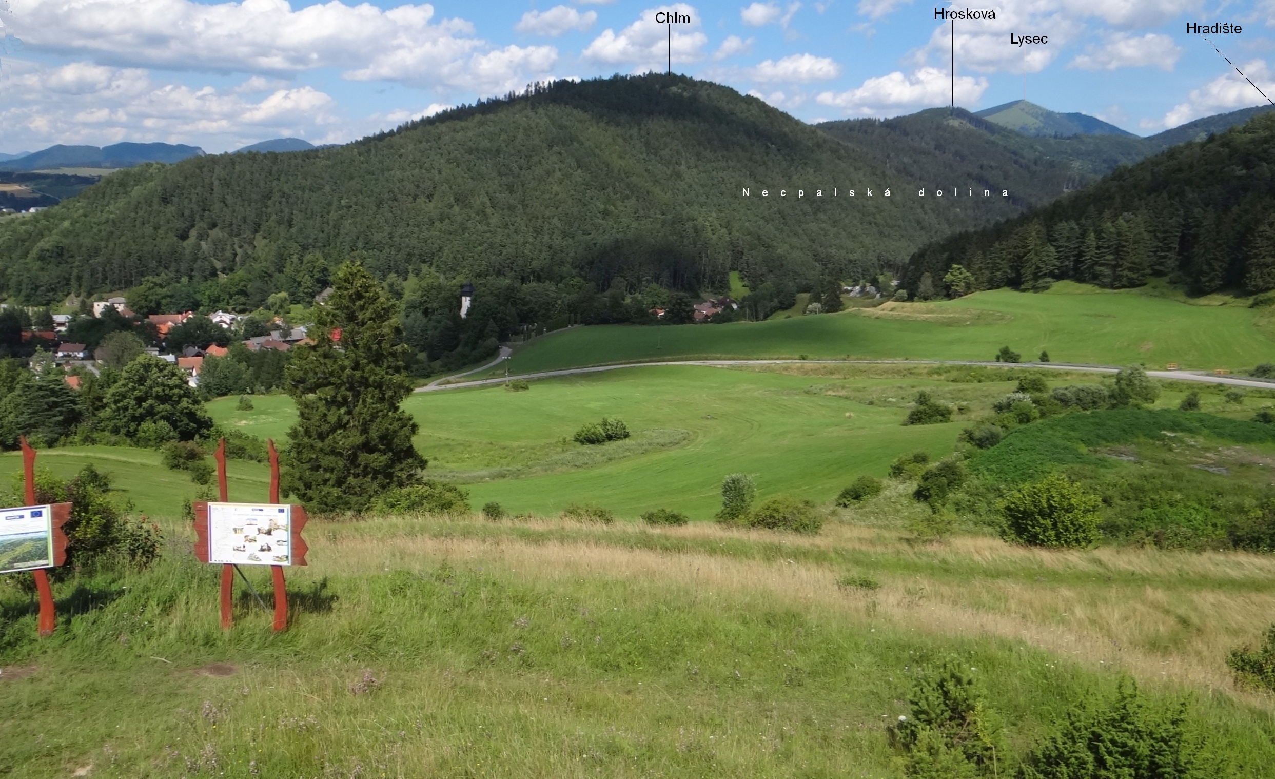 Necpaly